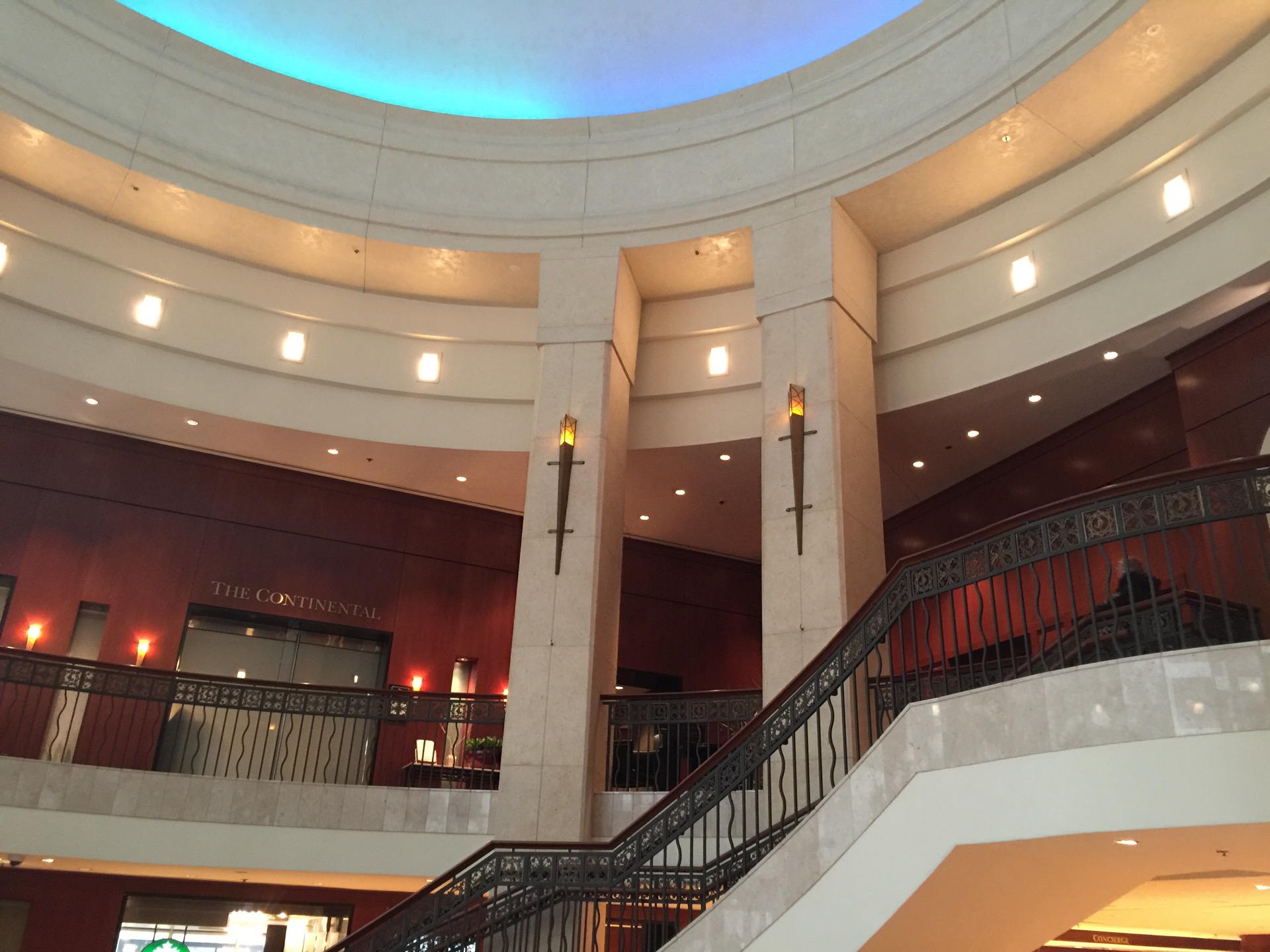 I'm at InterContinental Chicago Magnificent Mile!